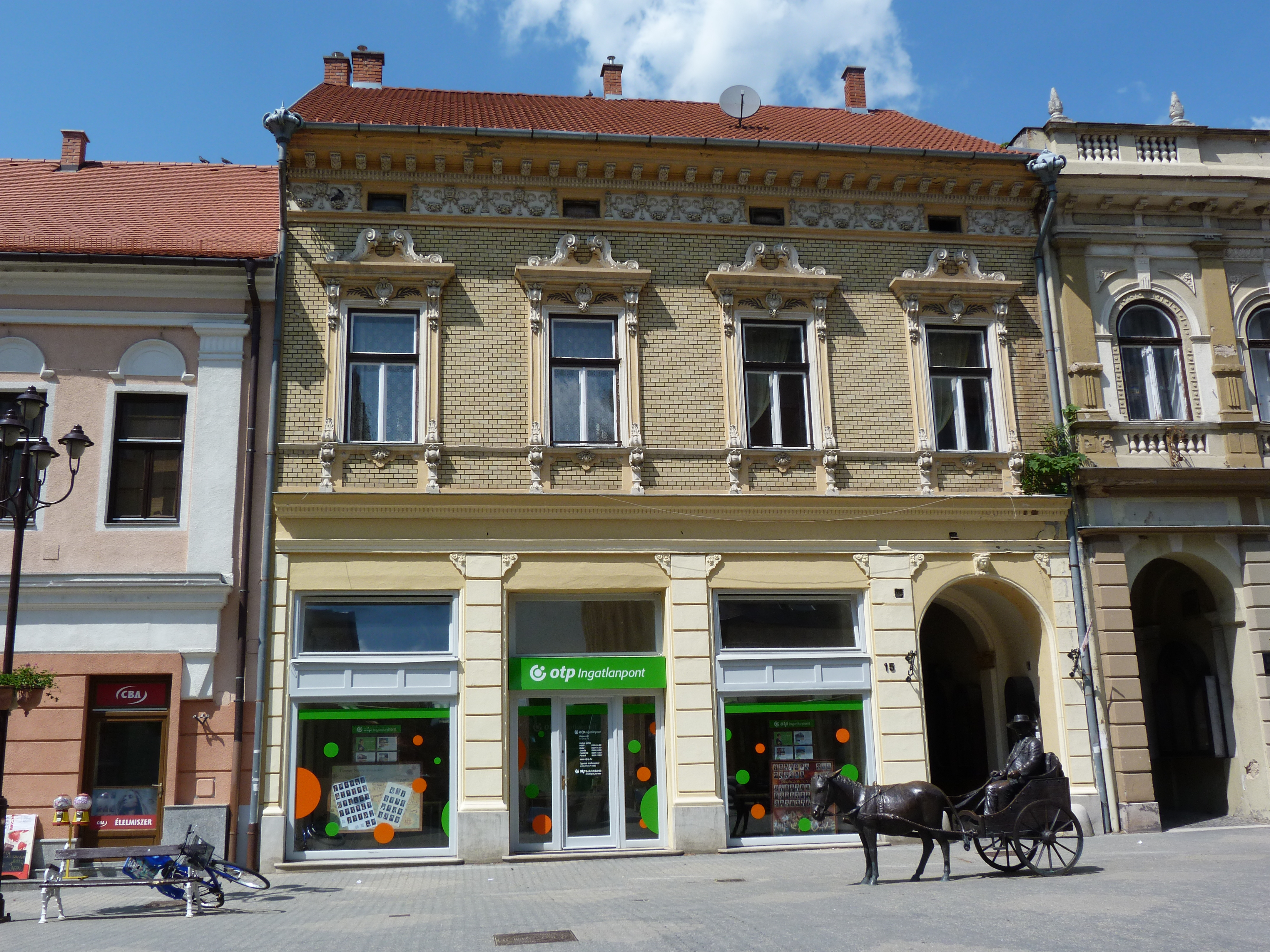 OTP Ingatlanpont. Az utcai homlokzat műemlék ID -12927. - Somogy m., Kaposvár, Fő u. 15.